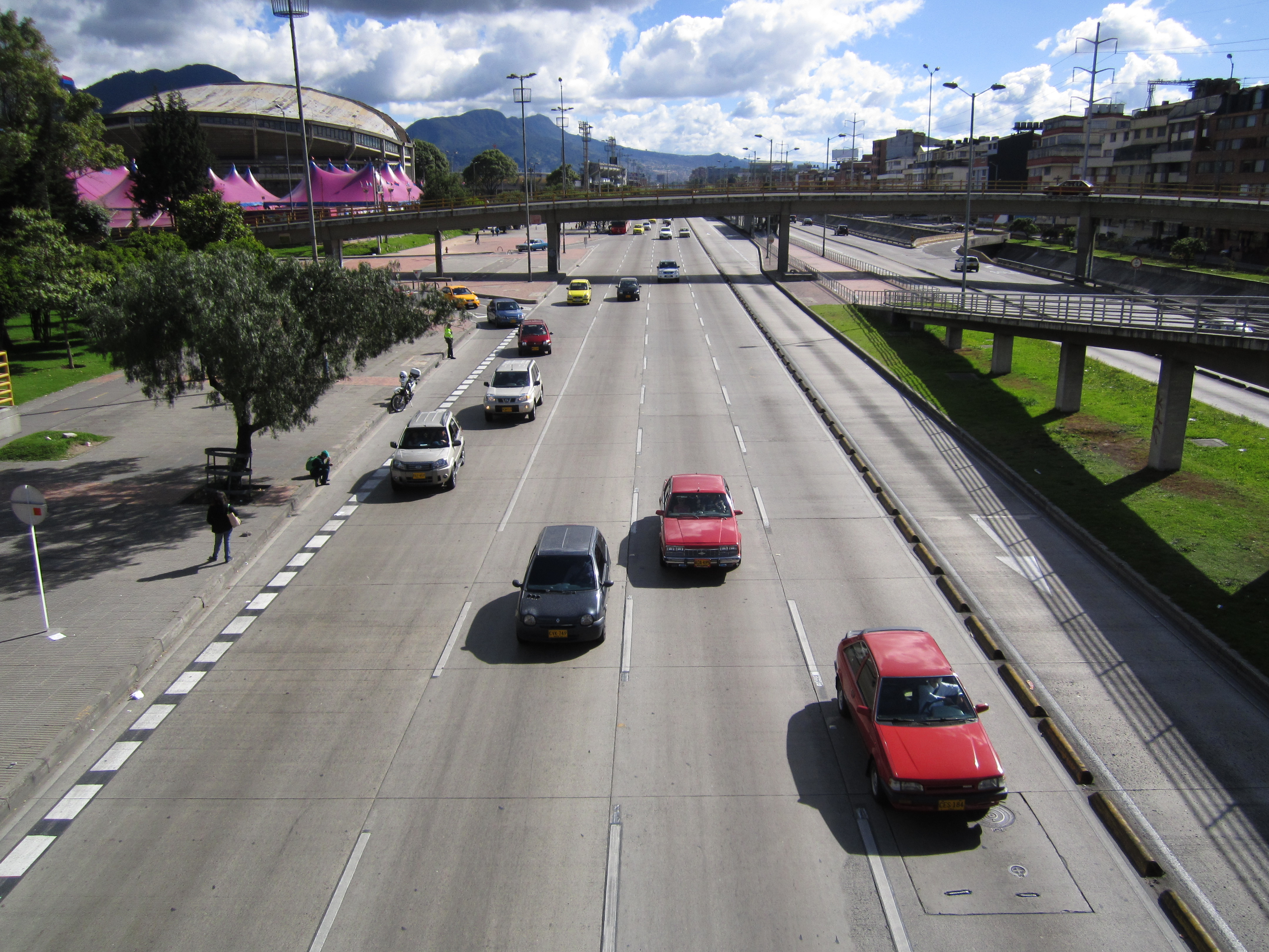 Carril oriental de la avenida 30 o NQS en Bogotá a la altura de la calle 63.